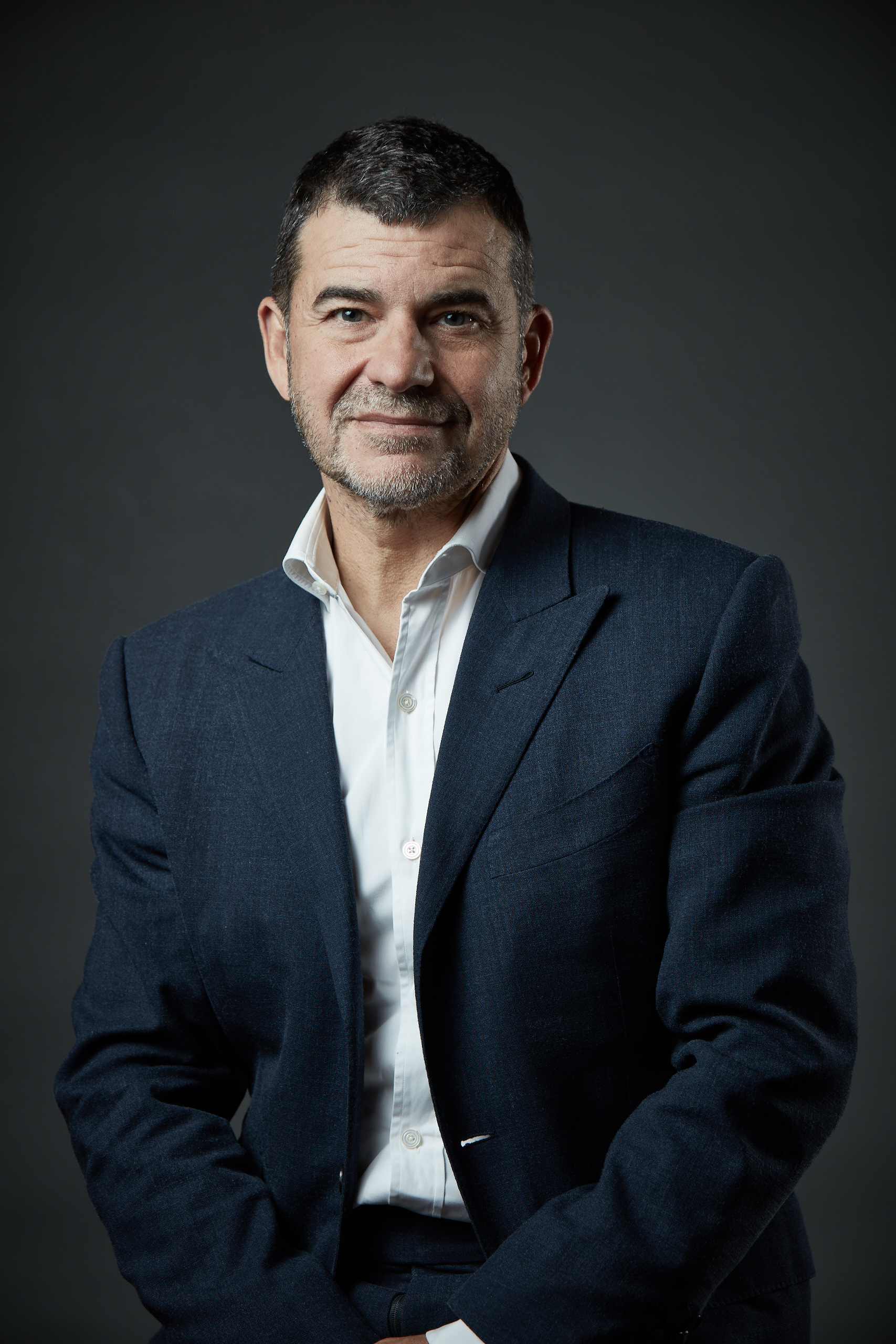 Miguel Matías Galuccio